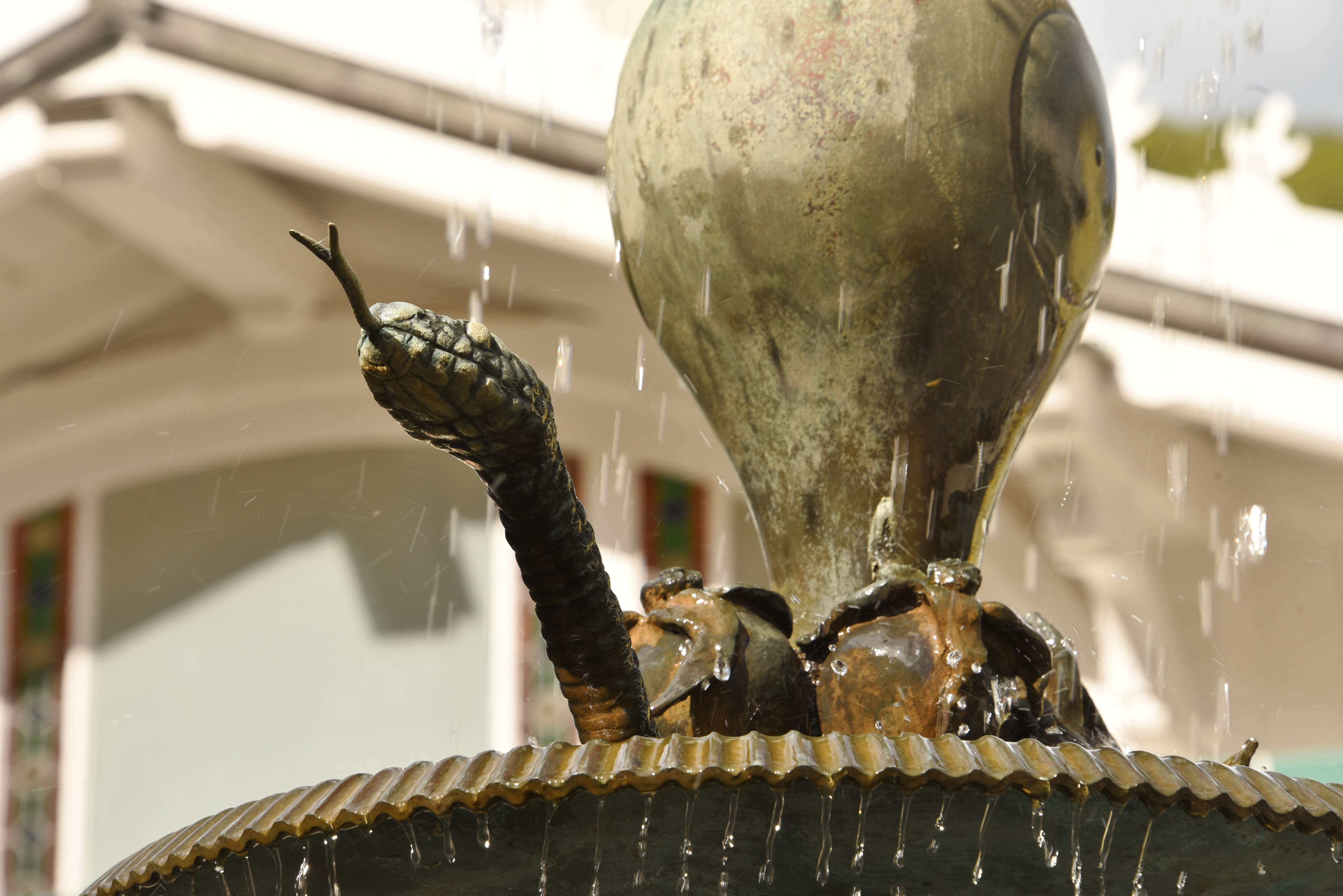 Brunnen beim Kurhaus Zámecké Lázně - Detail